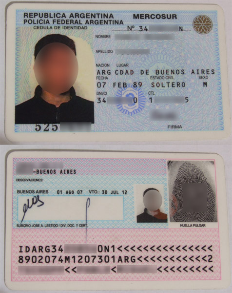 Cédula de Identidad Argentina, otorgada por la Policía Federal. Año 2007.